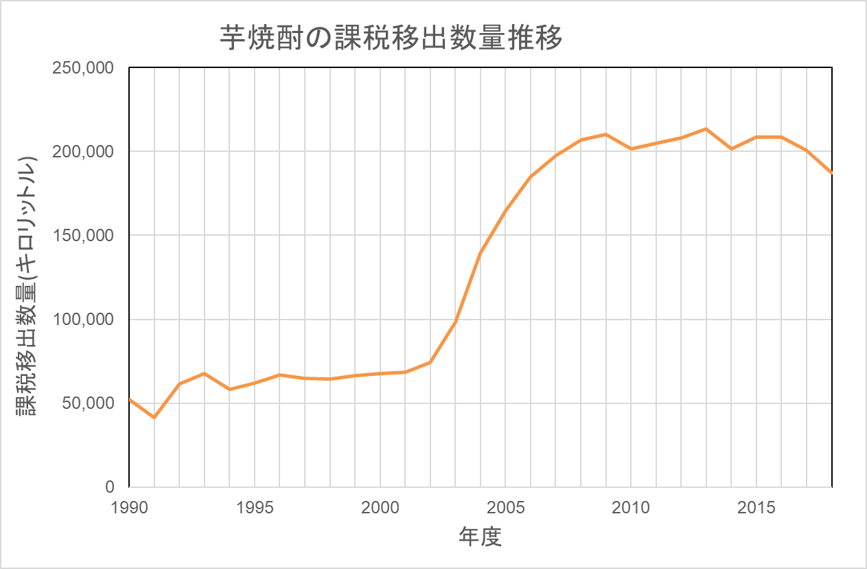 日本酒造組合中央会 単式蒸留しようちゆう課税移出数量（年度別・原材料別・度数別）を基にExcelで新規作成